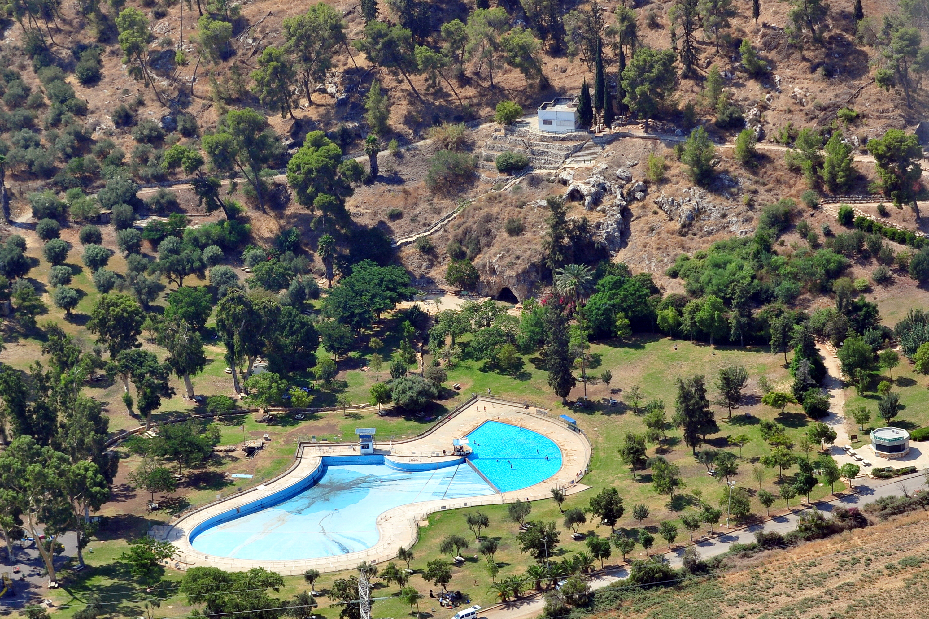 בית חנקין - מתחם הקבר של יהושע ואולגה חנקין נמצא בגן הלאומי מעיין חרוד